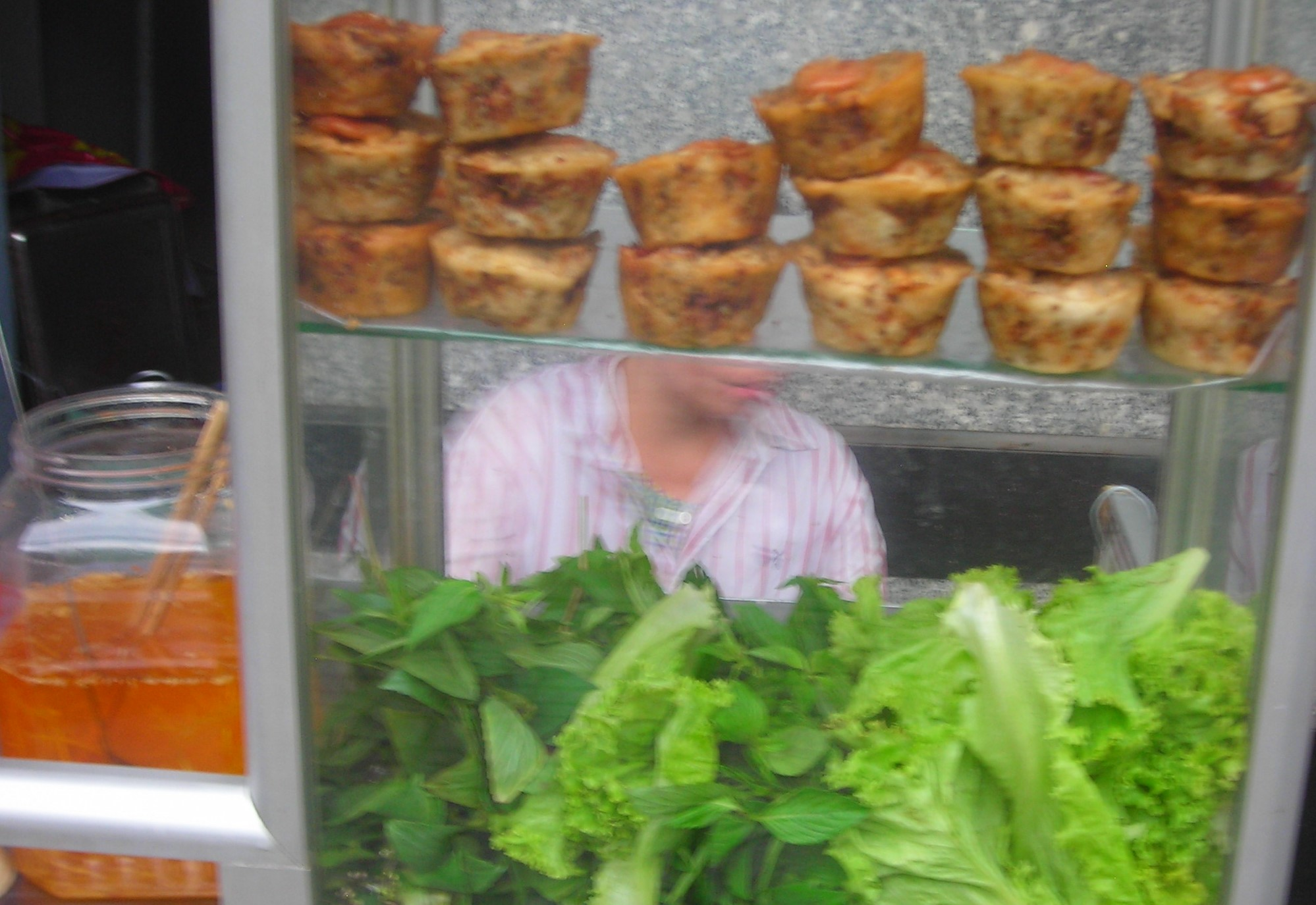 Vitrine de bánh cống et salad